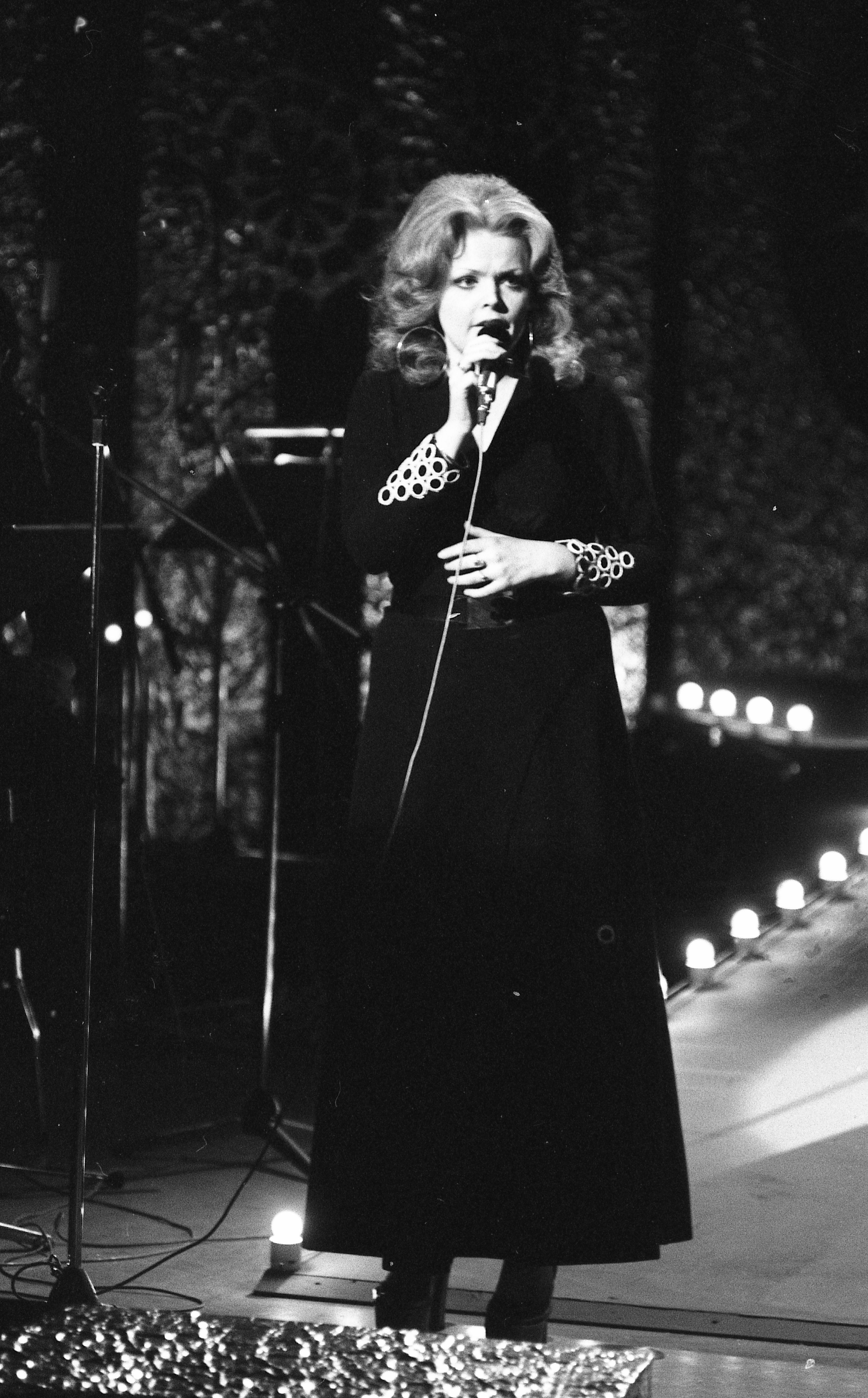 Melodi Grand Prix, norsk finale i TV-studio 1 NRK, 1974. Fra generalprøven. Foto: Petter R. Iversen. Arkivref.: PA-0797_U_7631_014_027